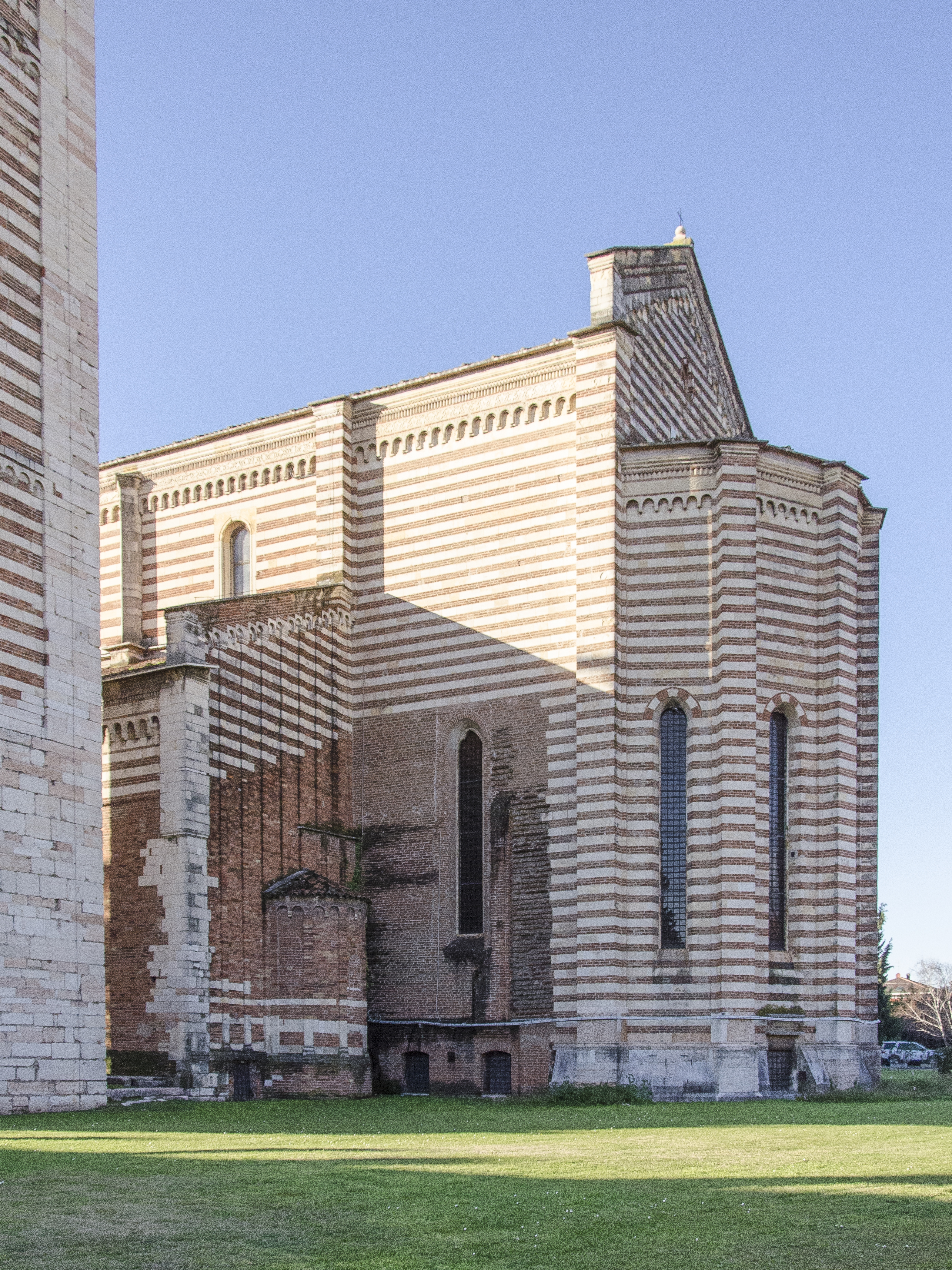 Retro della basilica